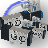 Zawory NAMUR PressMann ze strony